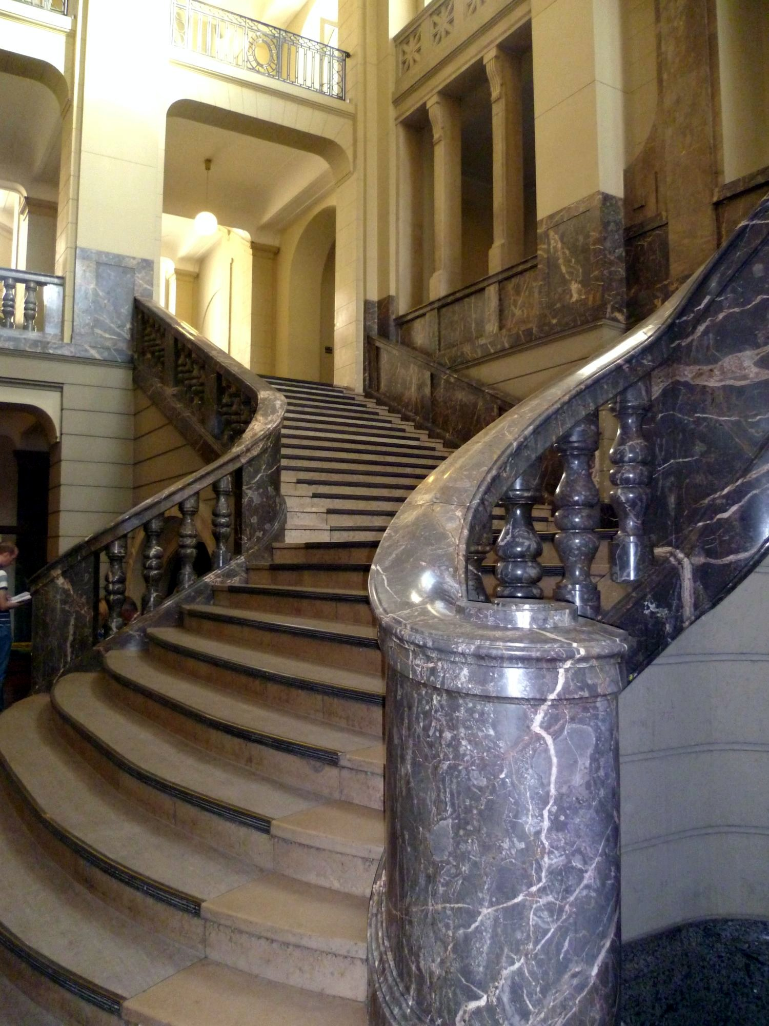 Bezirksregierung Düsseldorf (Cecilienallee 1–2), Gebäude von 1911, Aufgang This is a photograph of an architectural monument.